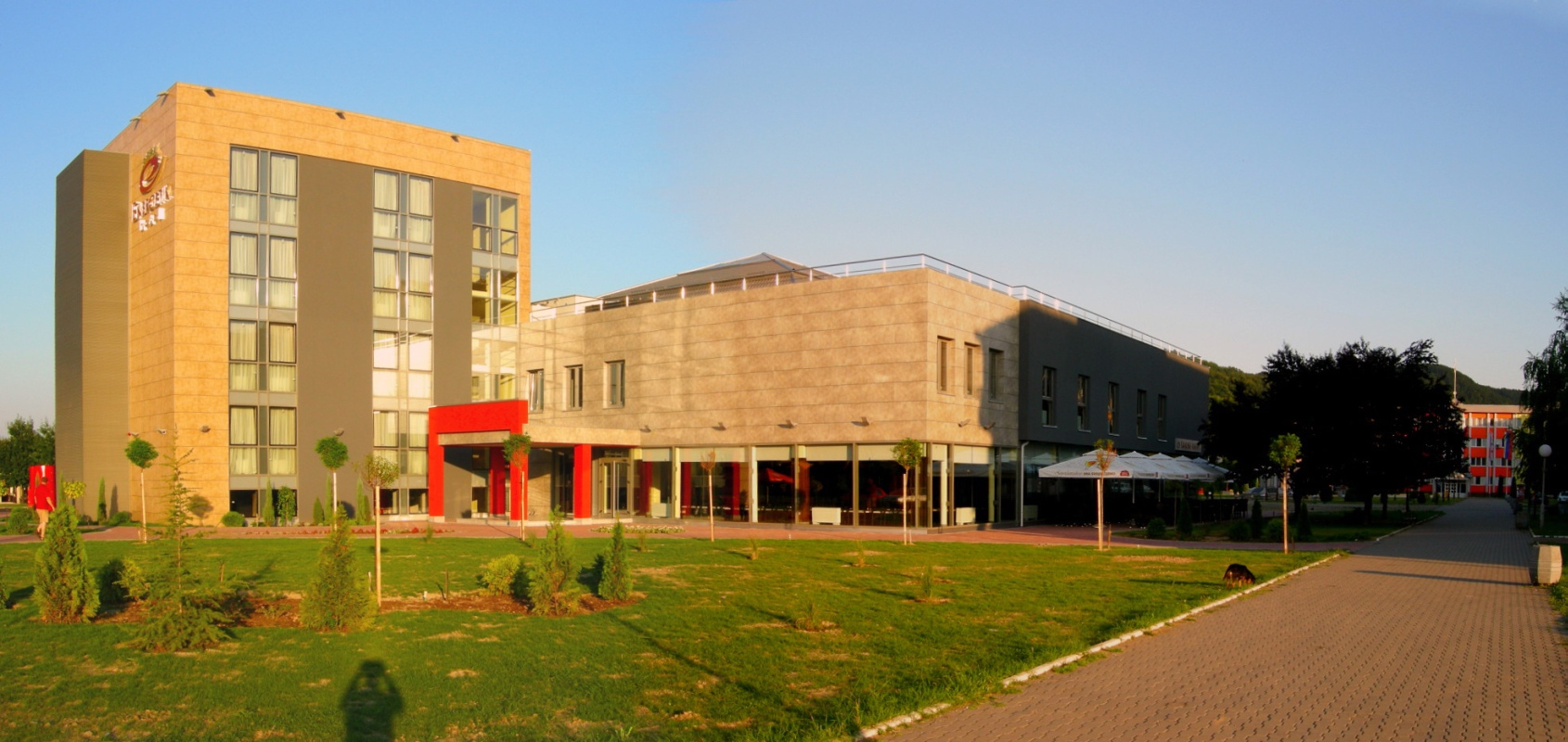 Hotel "Energetik" u Ugljeviku, nakon rekonstrukcije.